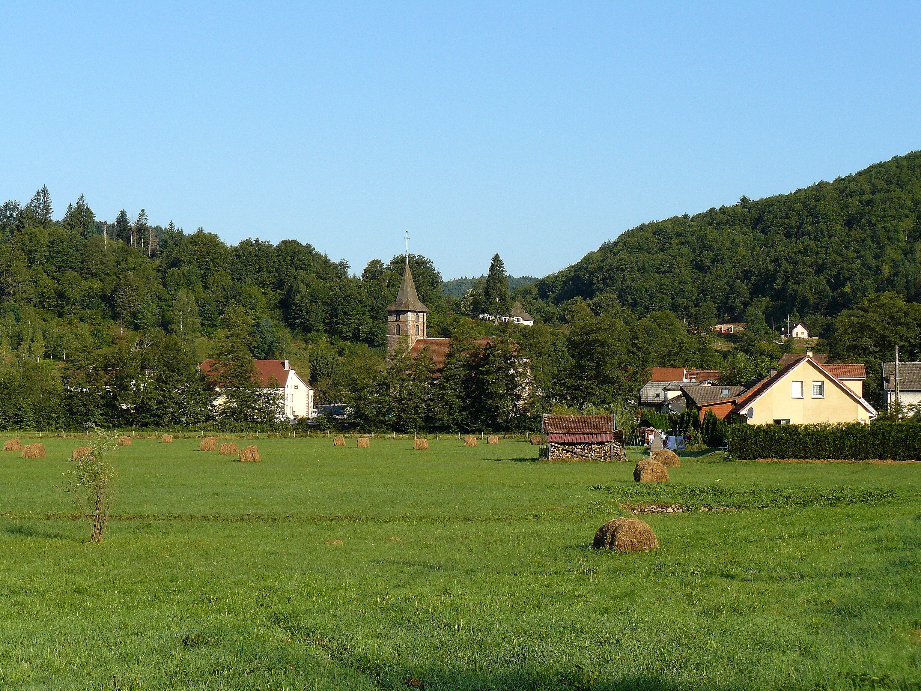 Vue de Servance (Haute-Saône, France)